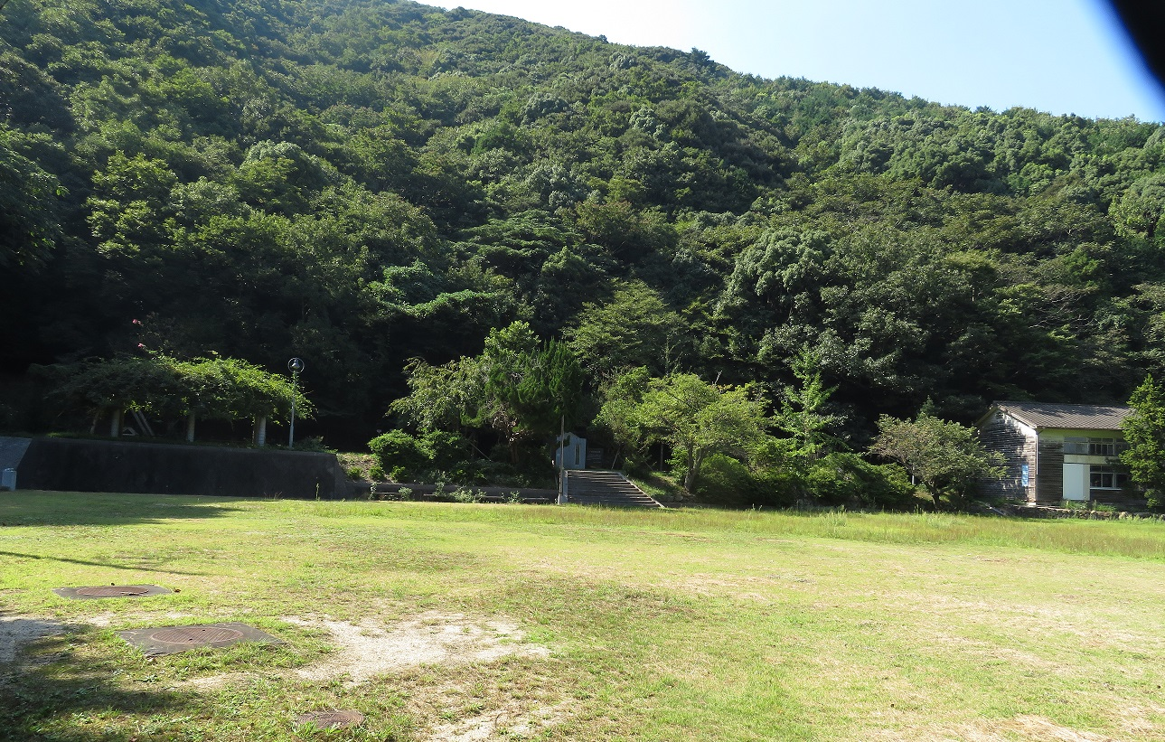 旧・上対馬町立小鹿小学校跡地